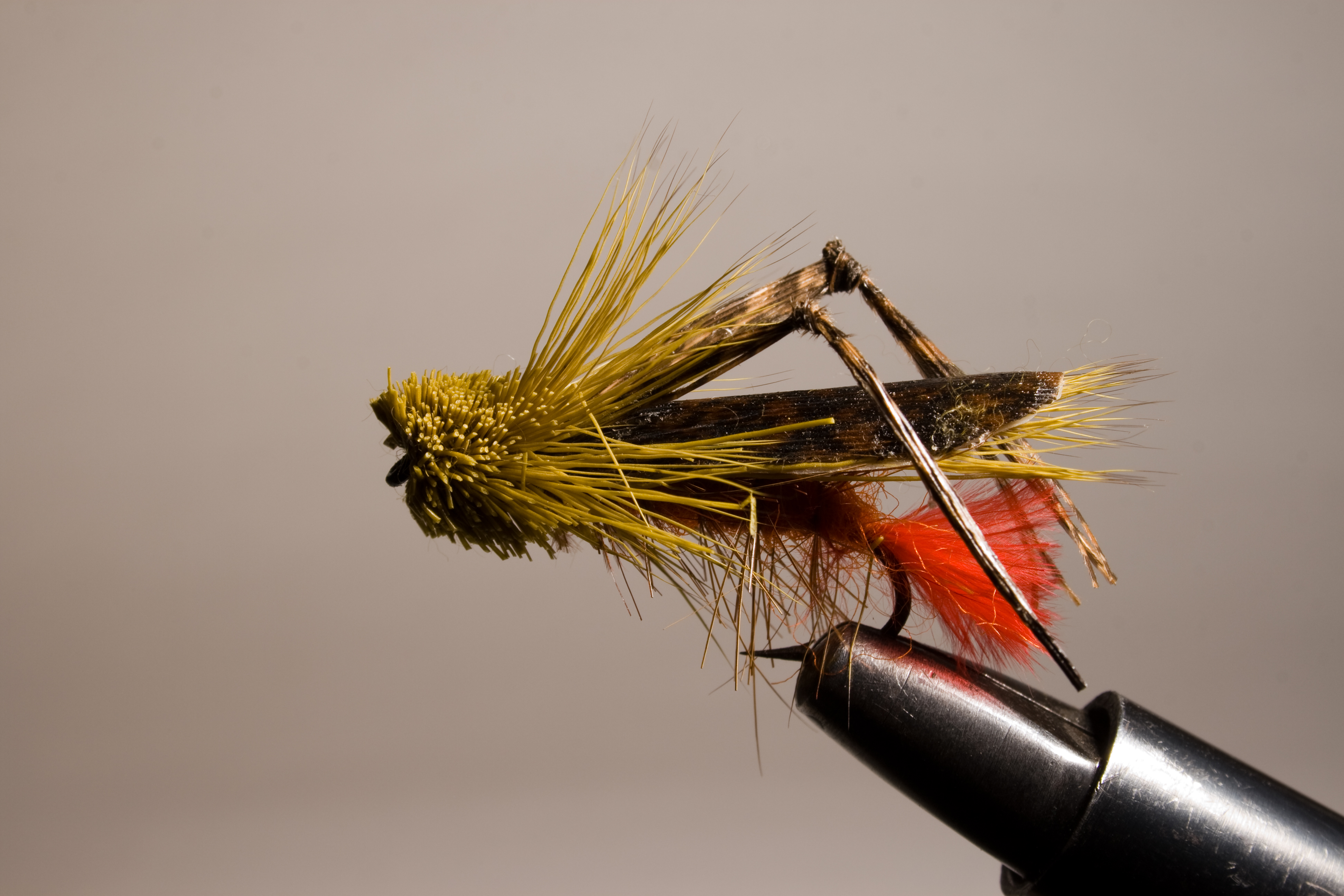 Mosca Seca, Imitacion de un saltamontes